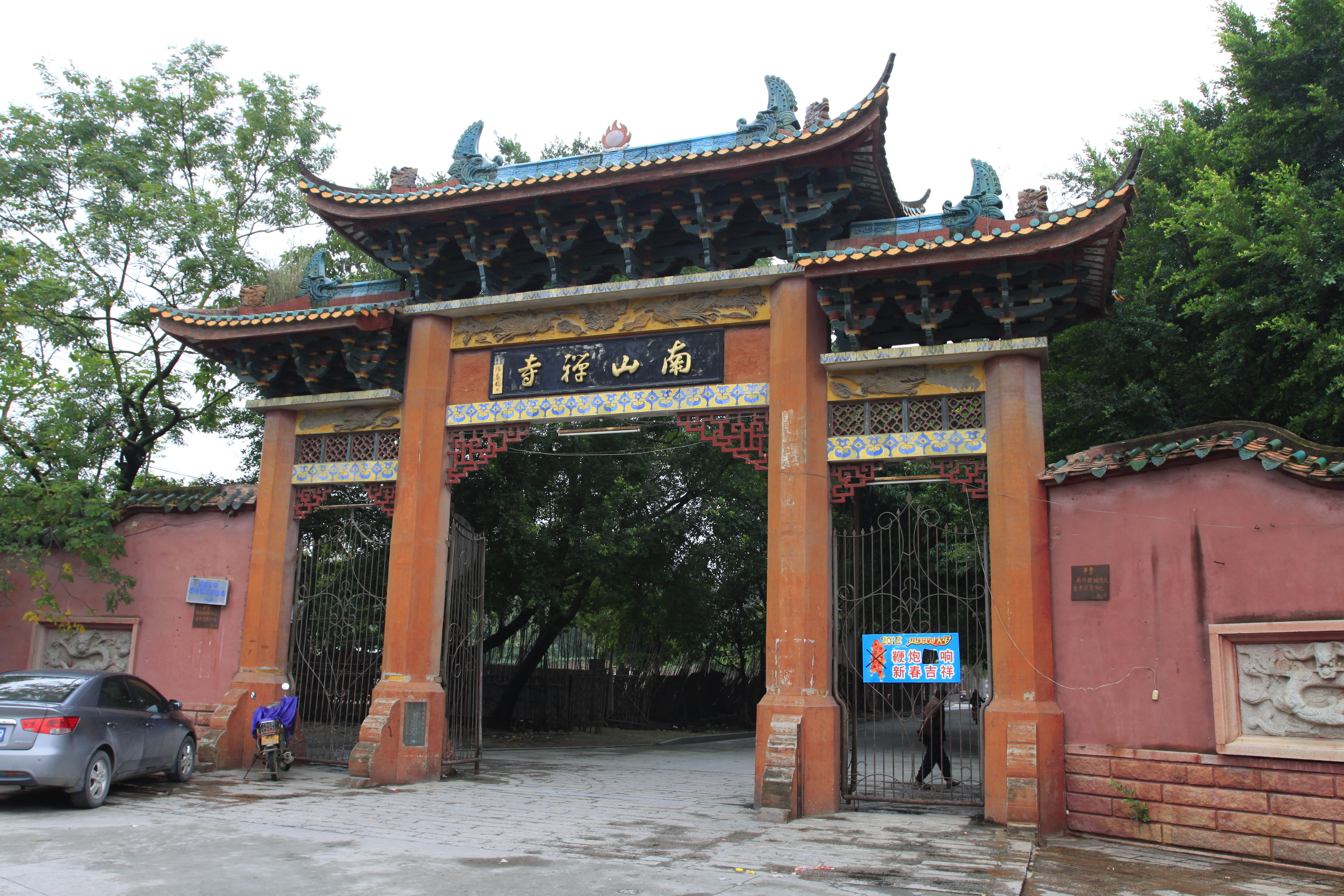 南山寺，位于中国福建省漳州市，是漳州市文物保护单位。